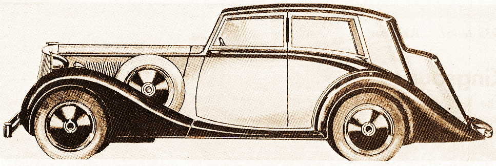 1938 Lammas-Graham 3 1/2-litre